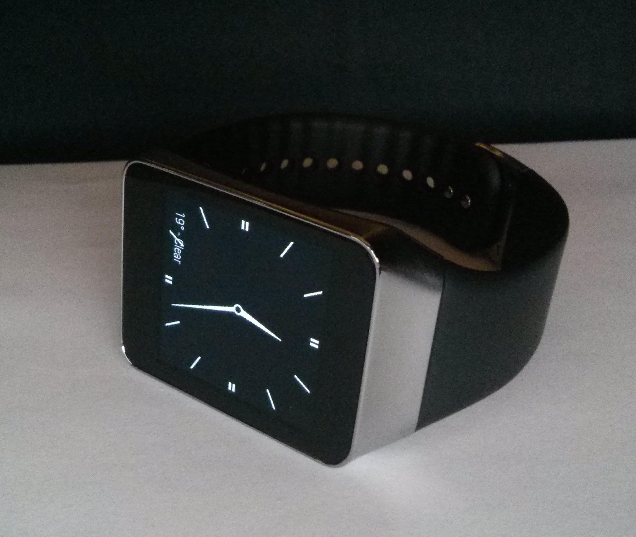 Samsung Gear Live